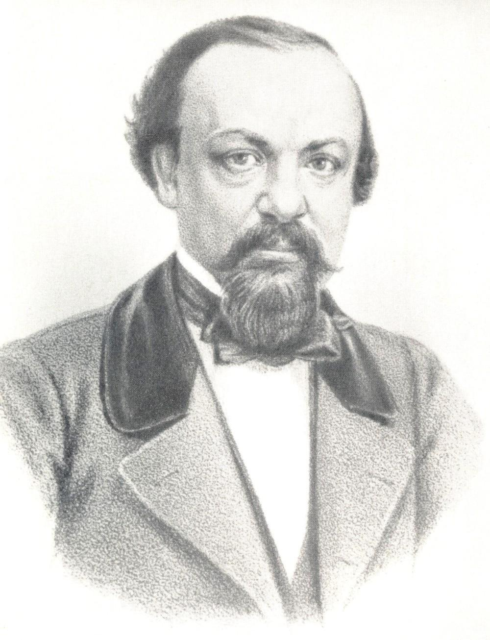 Portrait of Russian writer Aleksey Feofilaktovich Pisemsky= Алексей Феофилактович Писемский (1821—1881), писатель (Литография)